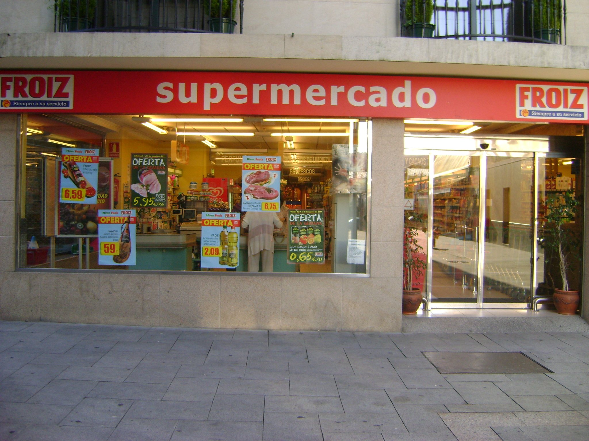 Supermercado Froiz, na Rúa Ramón González, no Porriño, provincia de Pontevedra, Galicia, España.